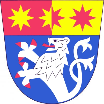 Znak obce Cholina